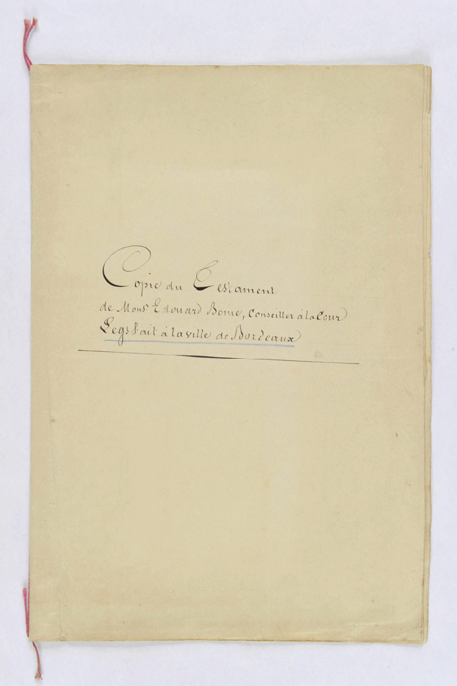 Édouard Bonie, Copie du Testament du 8 janvier 1885. Manuscrit 1893/12/25 (94.11.509).